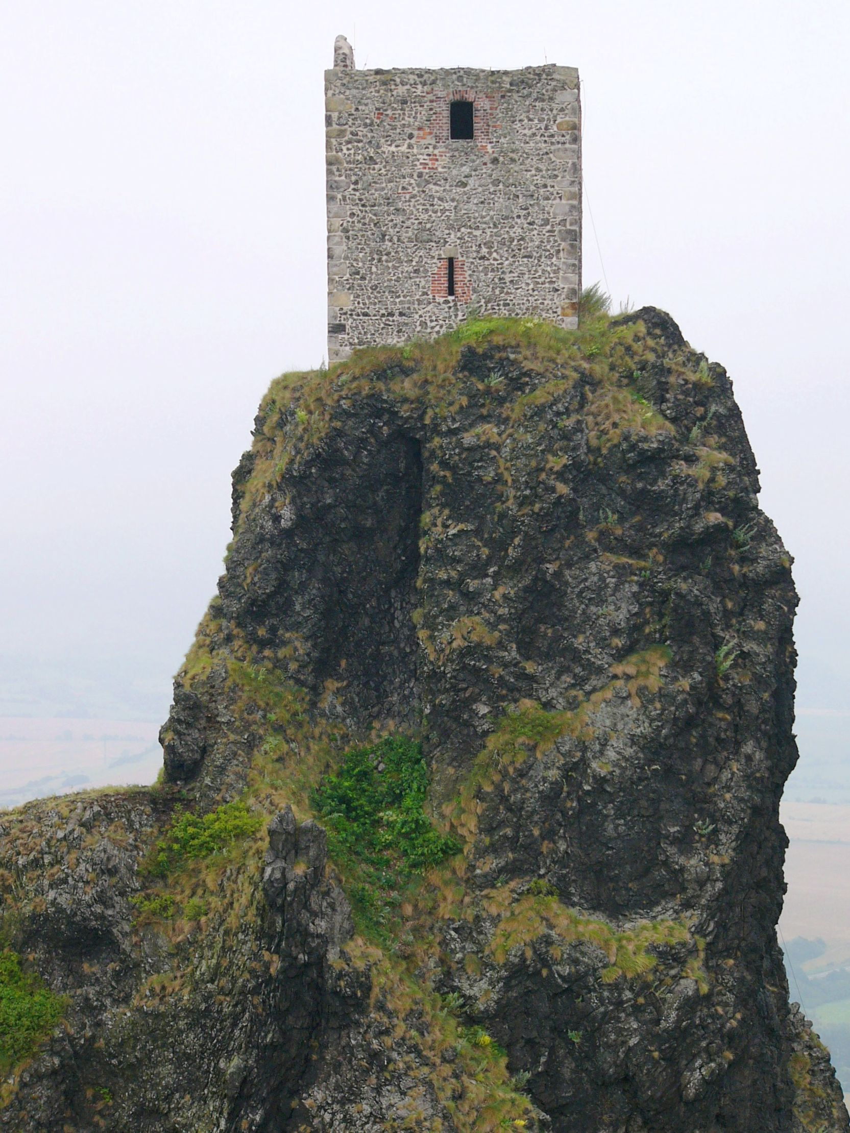 Věž “Panna” při pohledi z věže “Baba”